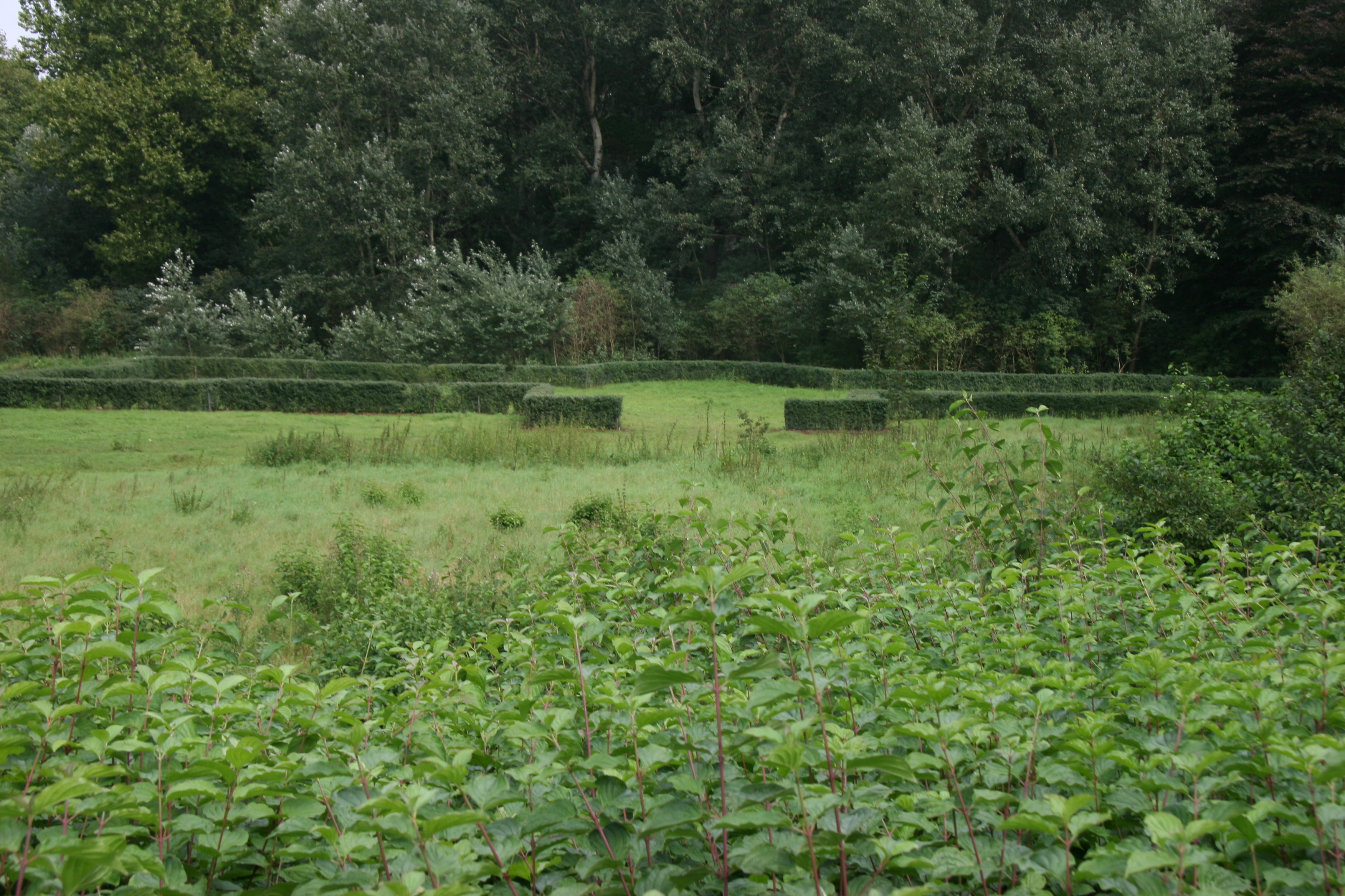 Der ehemalige Standort von Haus Buddenburg heute.